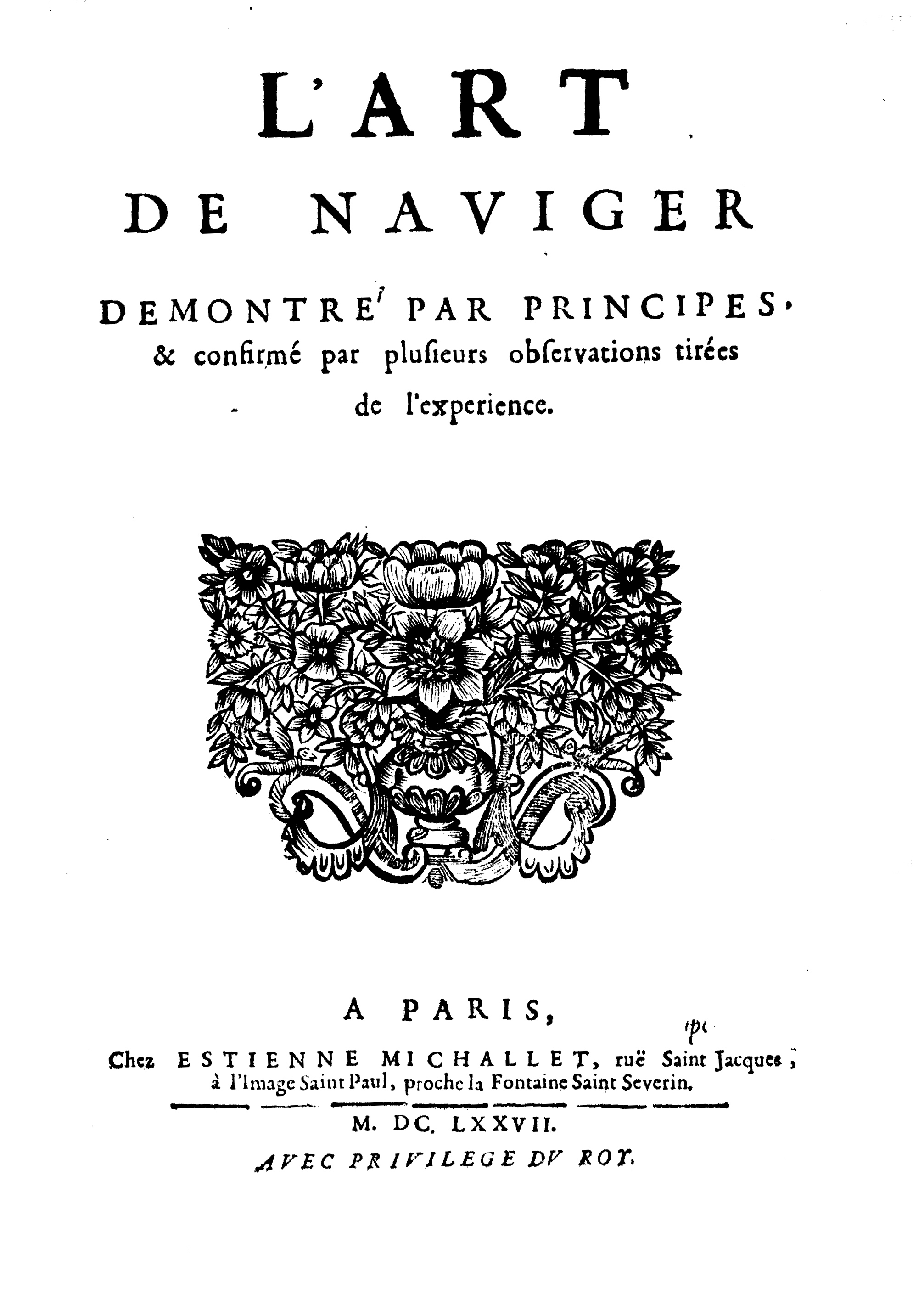 Frontespizio